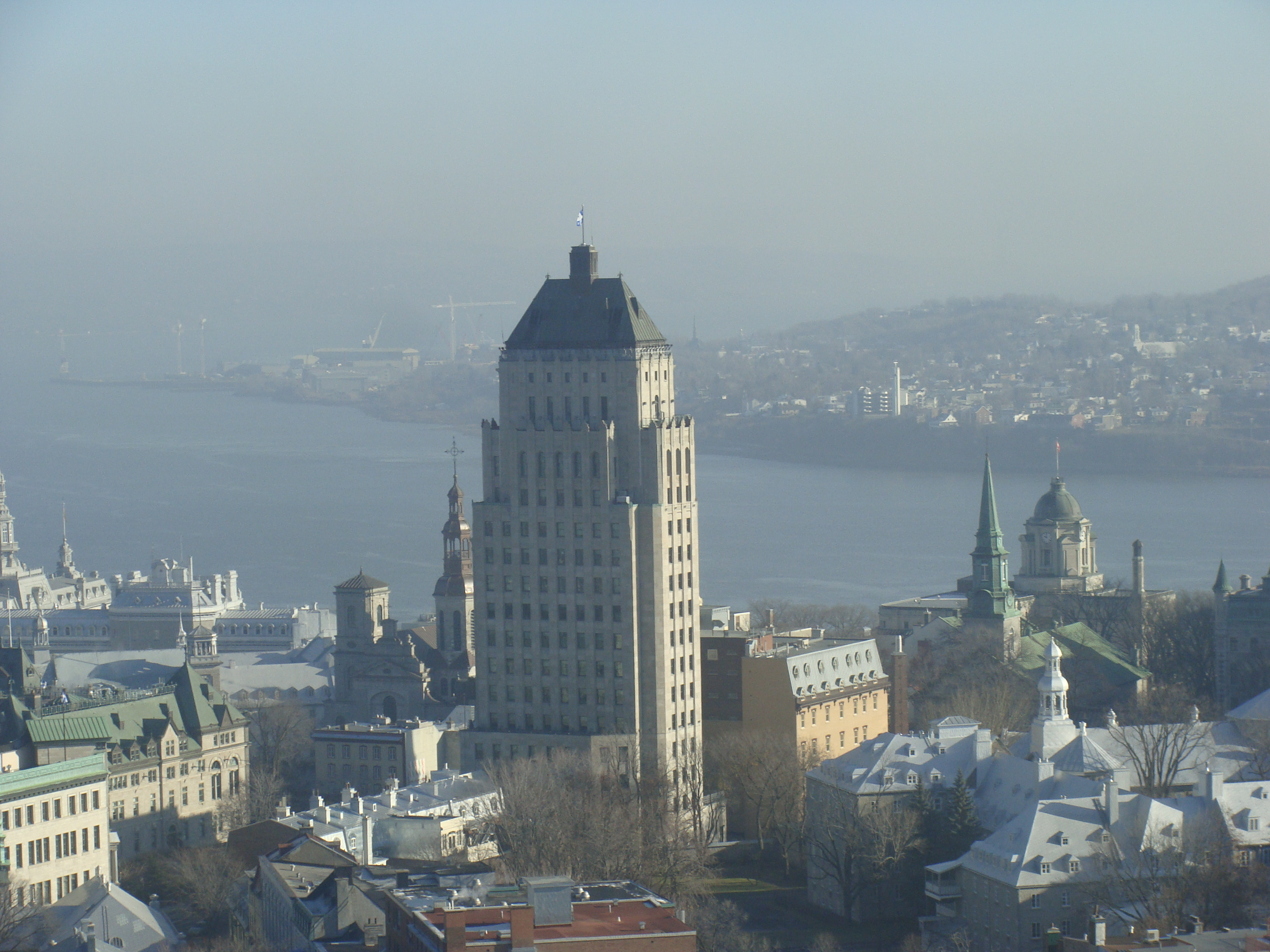 Vue de la ville de Québec à partir du 19ième étage de l'hôtel Hilton.